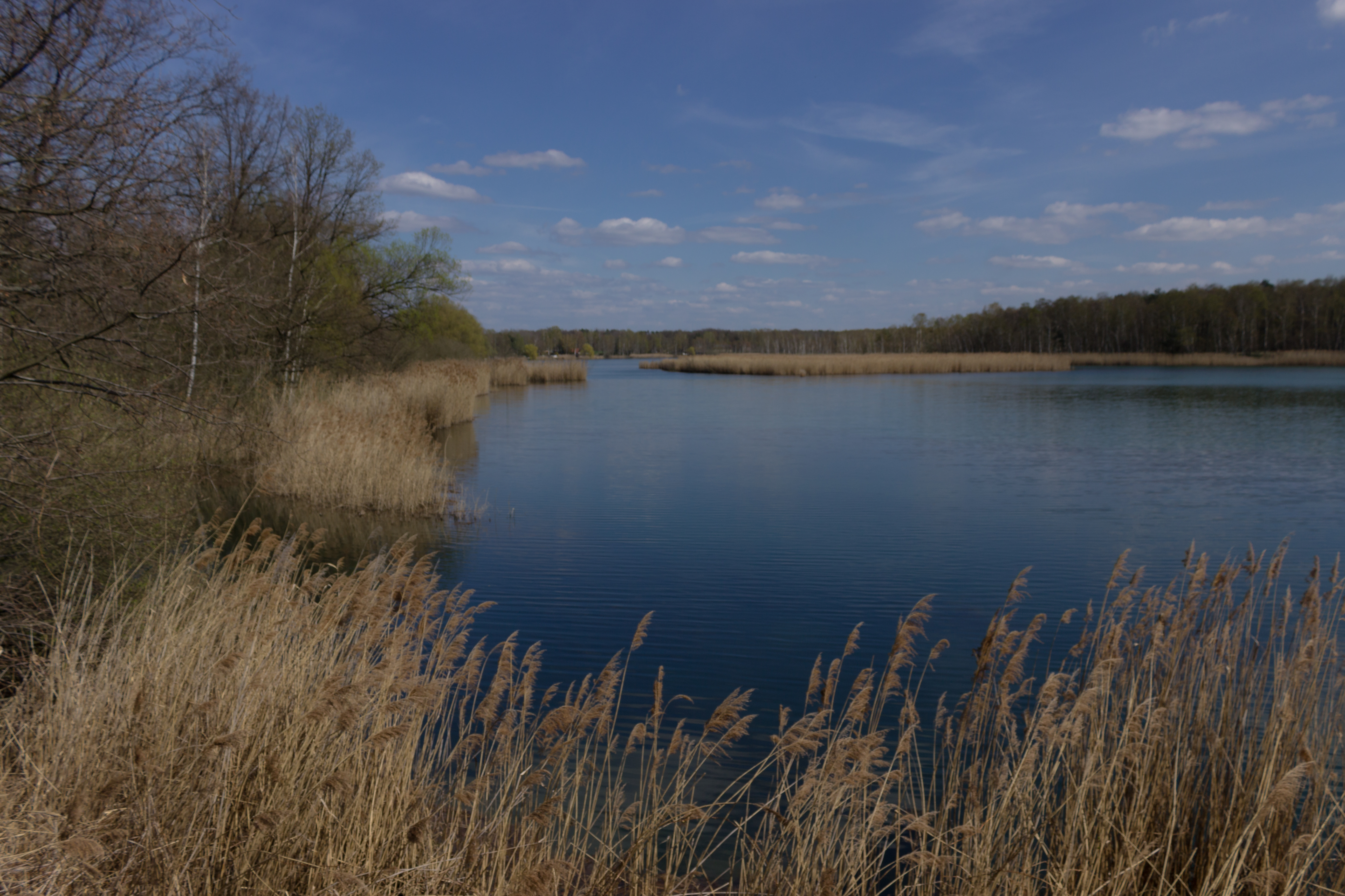 Bioshärenreservat Oberlausitzer Heide- und Teichlandschaft Olbasee - Wartha - Sachsen